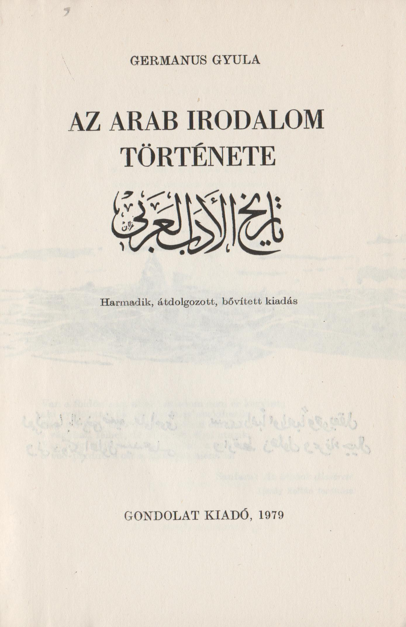 Az adott mű címlapja.